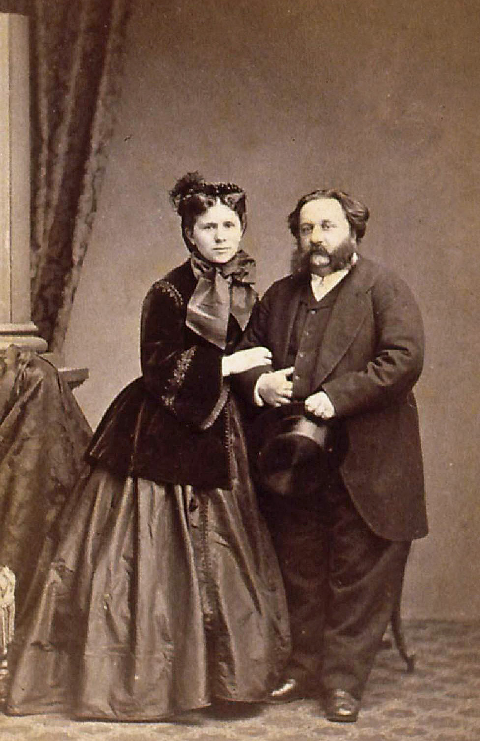 Marie Jaëll coiffée d'un chapeau, donnant le bras à Alfred Jaëll qui tient un chapeau haute-forme à la main. Bibliothèque nationale et universitaire de Strasbourg